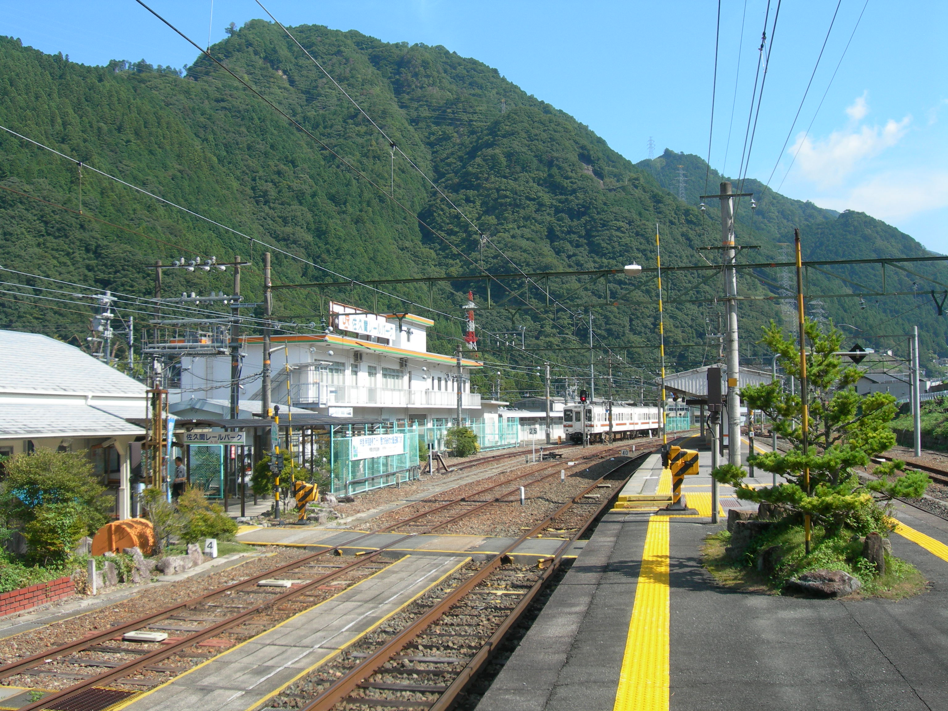 中部天竜駅プラットホーム